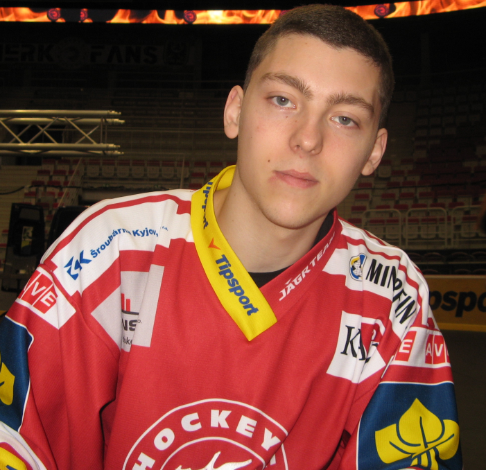 Po zakončení sezóny 2014/15 ve Werk Areně